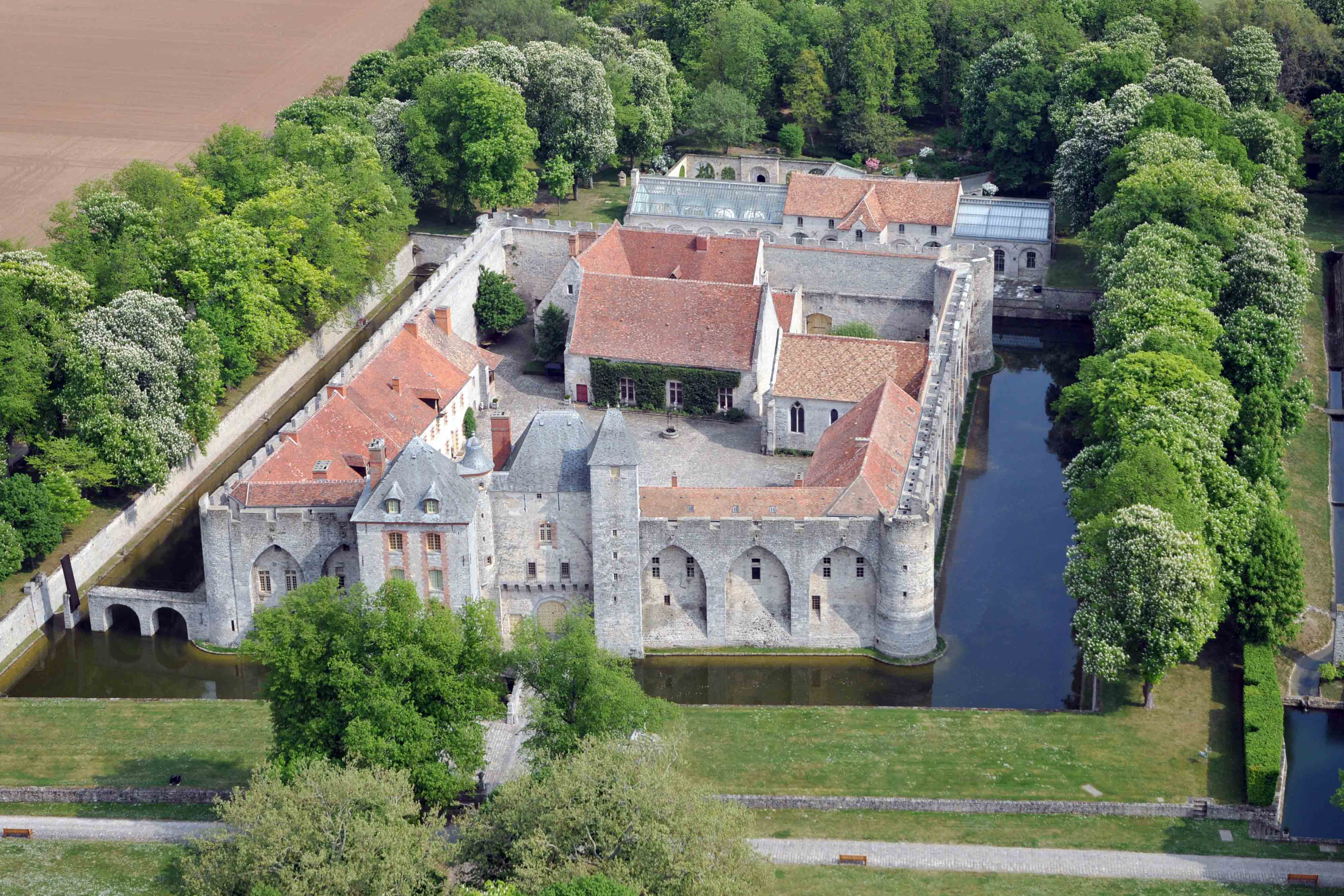 Chateau de Farcheville